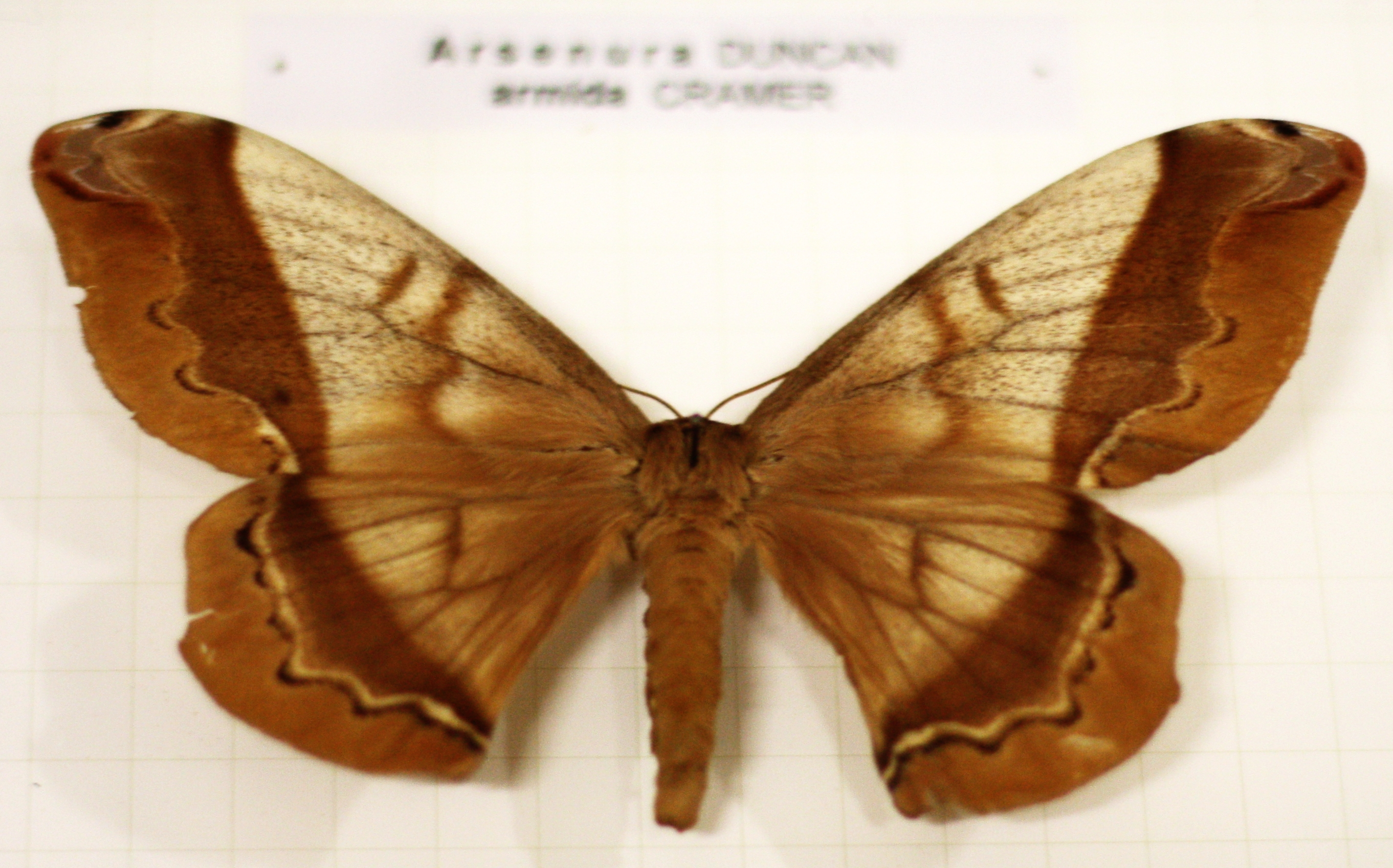 Naturkundliche Sammlung Übermaxx Überseenuseum Bremen; Schmetterlinge und andere